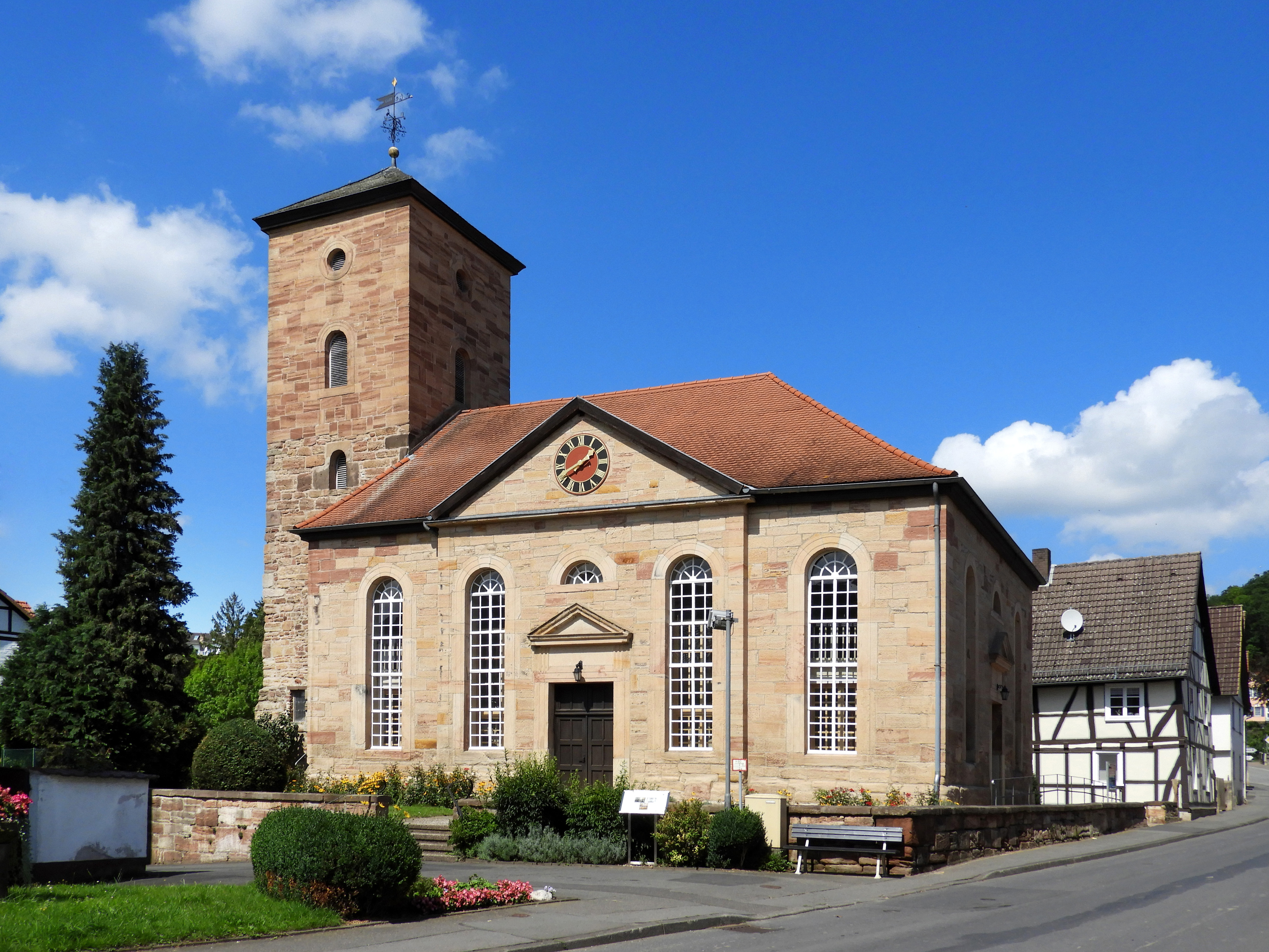 Als der Vorgängerbau der Kirche in den Jahren 1819 und 1820 wegen Baufälligkeit abgerissen werden musste, wurde die heutige Pfarrkirche im klassizistischen Stil, nach den Plänen des kurhessischen Landbaumeisters Johann Friedrich Matthei, an gleicher Stelle gebaut.